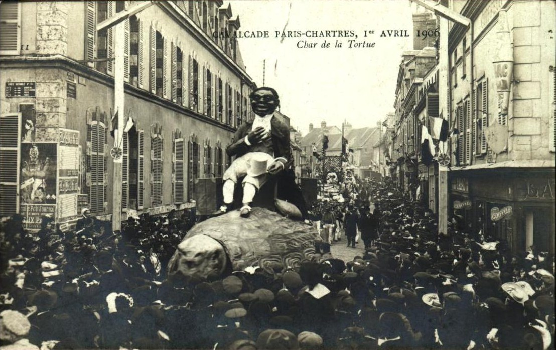 Le Char de la Tortue venu de Paris défile à la Cavalcade Paris-Chartres à Chartres le 1er avril 1906.